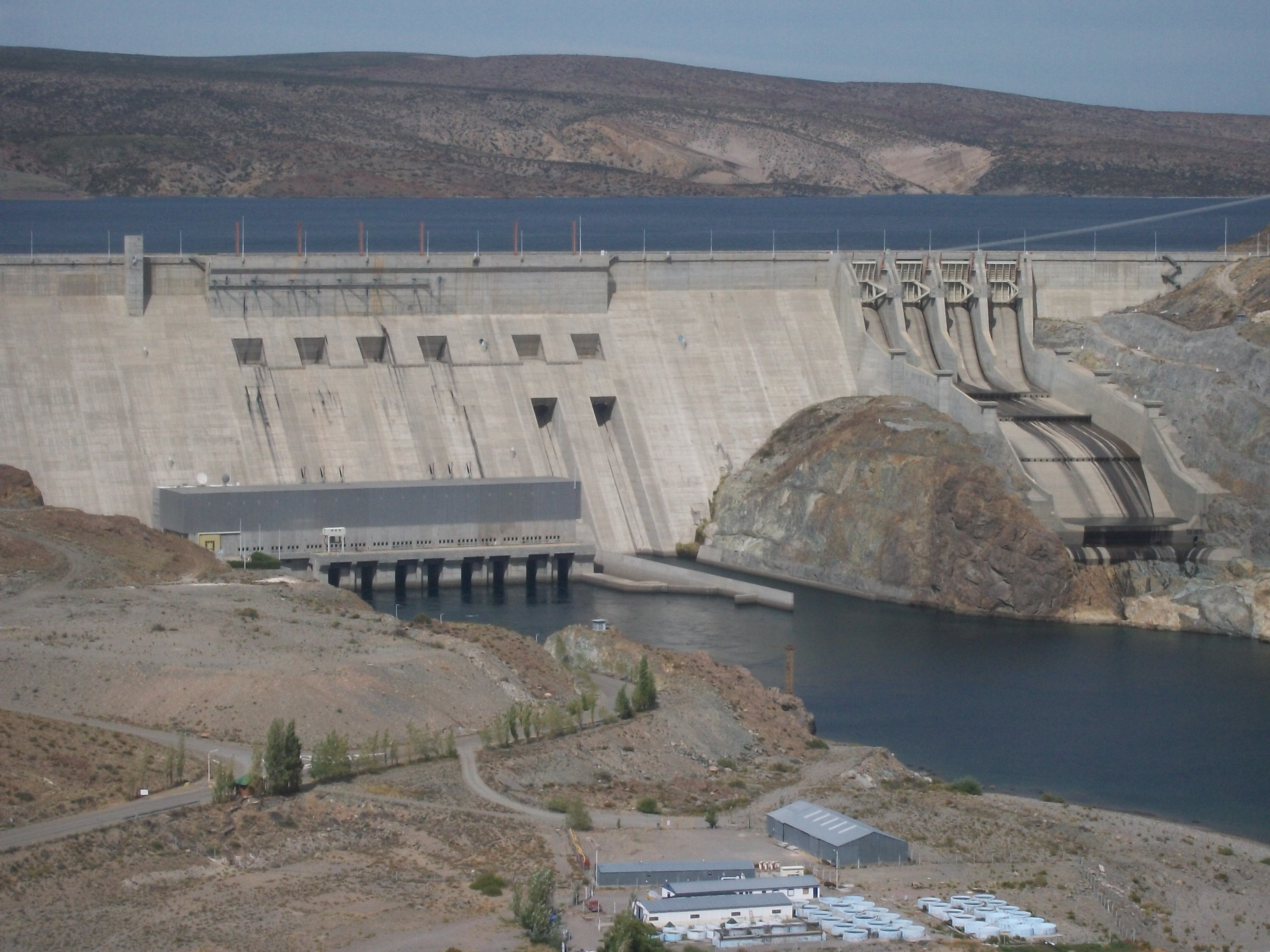 Represa Piedra del Aguila